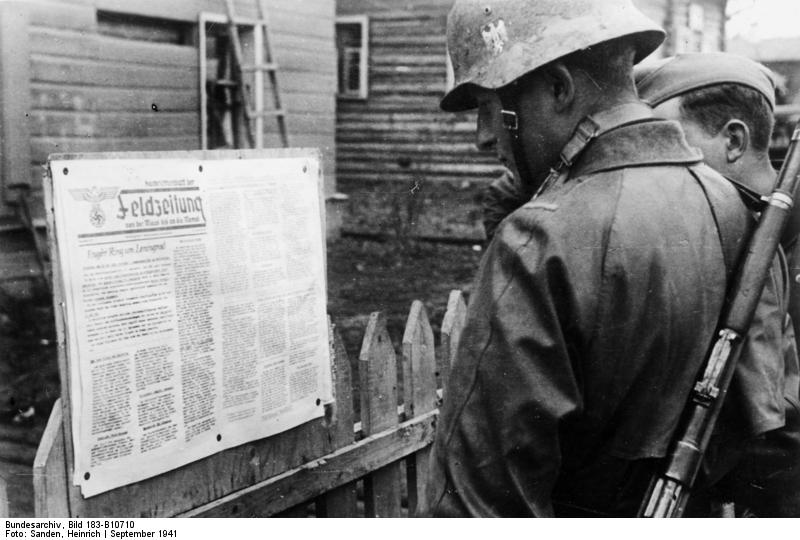 Russland-Süd, Soldaten vor Feldzeitung An der Sowjetfront. Bei den grossen Entfernungen und schlechten Wegeverhältnissen kann die eigentliche Feldzeitung nicht so schnell nach vorn gebracht werden, aber ein provisorisches Nachrichtenblatt mit den wichtigsten und letzten Meldungen erfüllt schon seinen Zweck. (Korossny) PK-Aufnahme: Kriegsberichter: Sanden Scherl Sept. 41